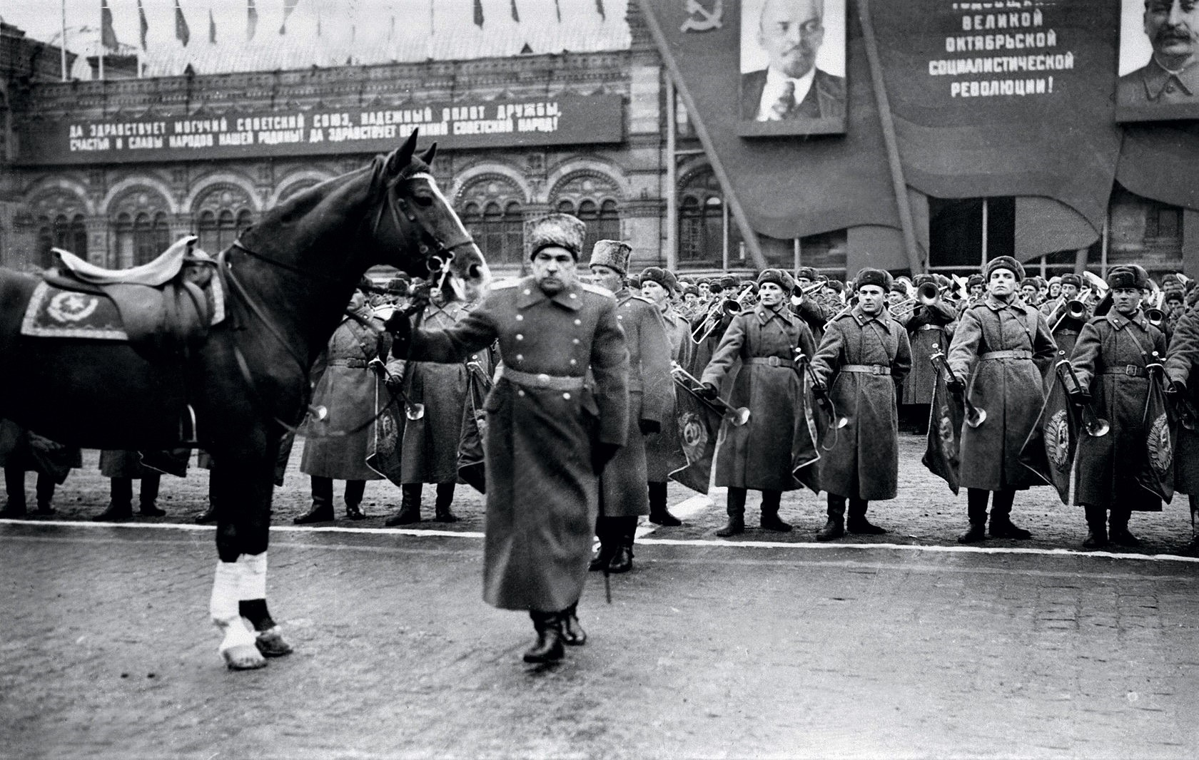 30-я годовщина Октябрьской революции. Маршал Советского Союза Л. А. Говоров готовится принимать парад войск Московского гарнизона на Красной площади